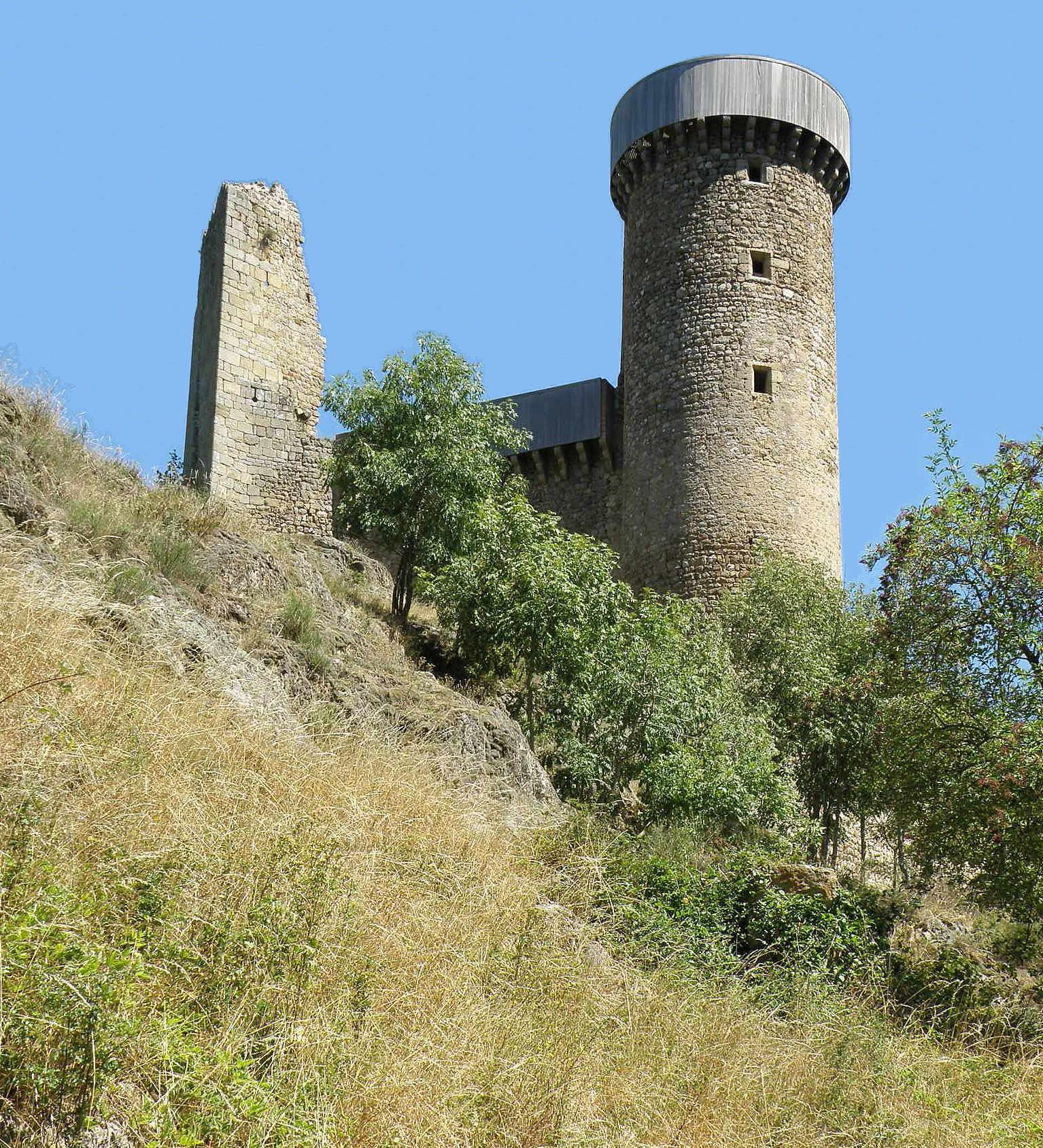 Château de Rochebaron, situé sur un piton rocheux dominant la plaine de la Loire près de Bas-en-Basset, dans le dép. de la Haute-Loire, France (région Auvergne). Les deux « grandes tours », c'est-à-dire, à droite, la tour ronde (ou tour des prisonniers, appelée également, mais improprement, le donjon) et à gauche, la tour triangulaire, reliées entre elles par une courtine faisant partie de l'enceinte ouest du château.